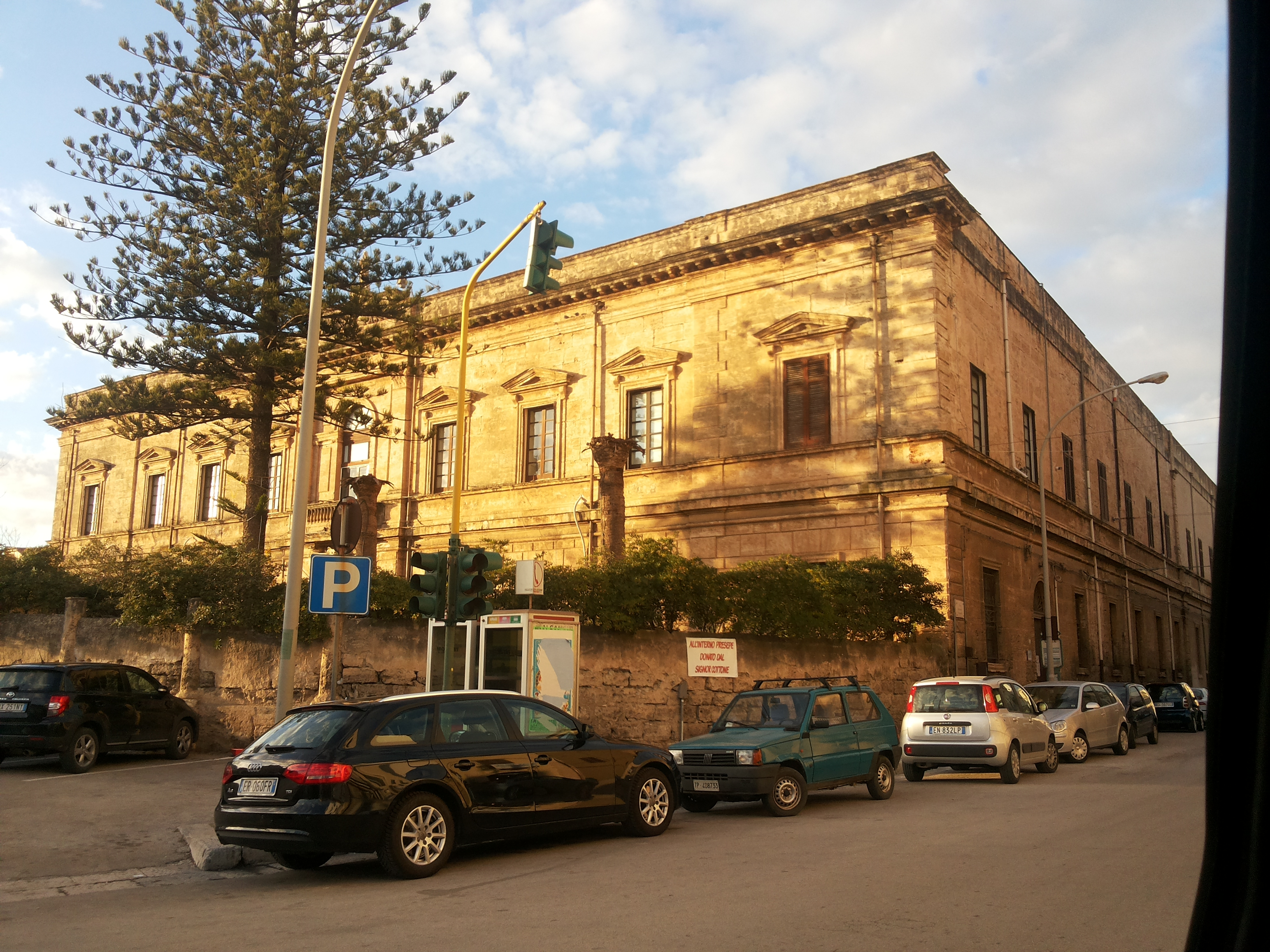 Pia Opera Pastore ad Alcamo